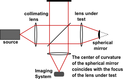 מייקלסון 8